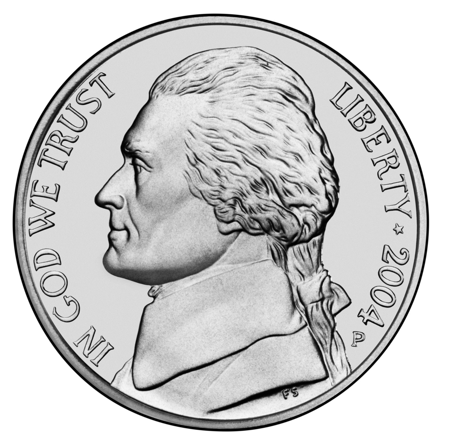 Jefferson Nickel obverse